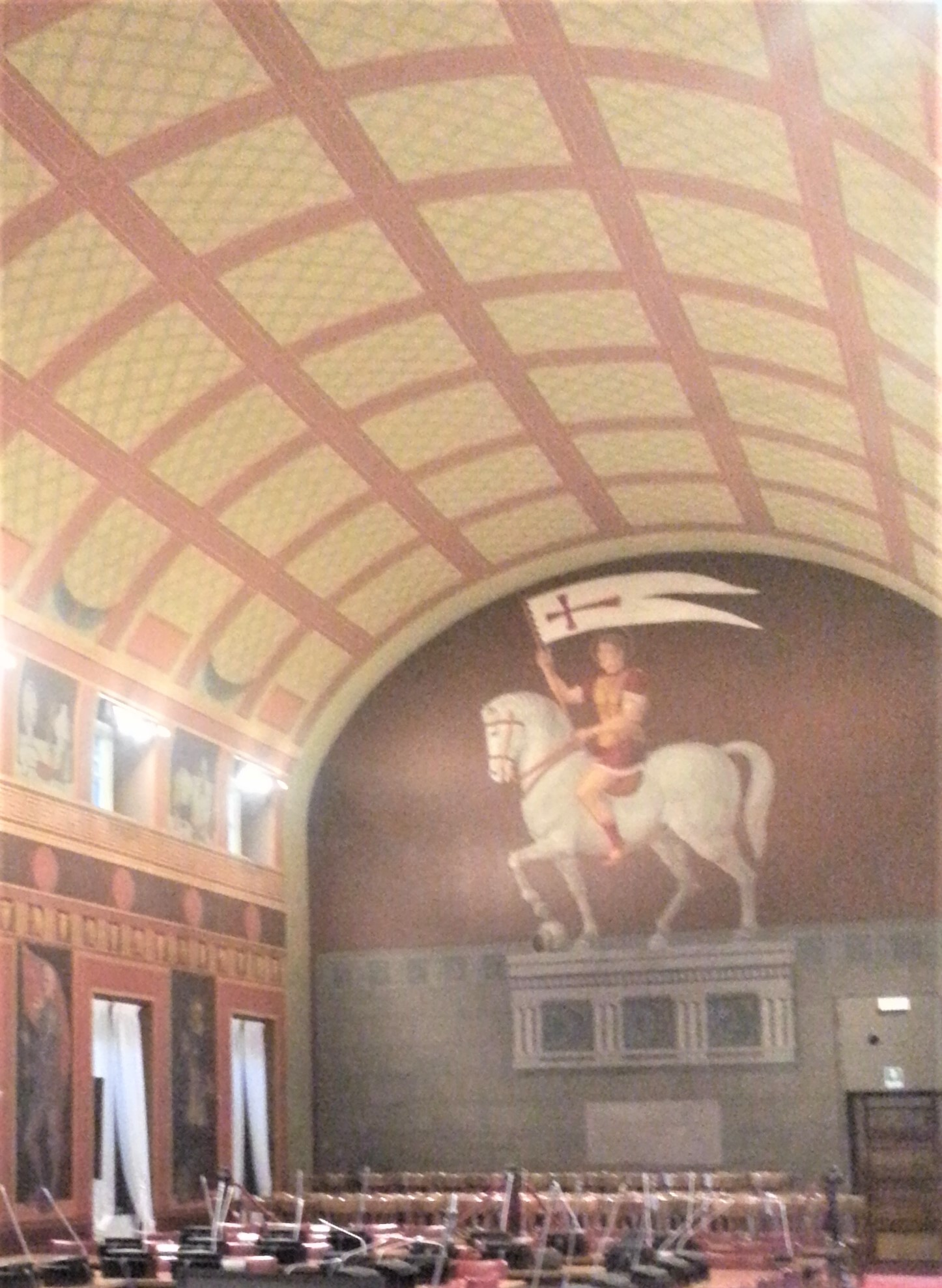 Immagine di sant Alessandro posta nella Sala Consiliare di Palazzo Frizzoni